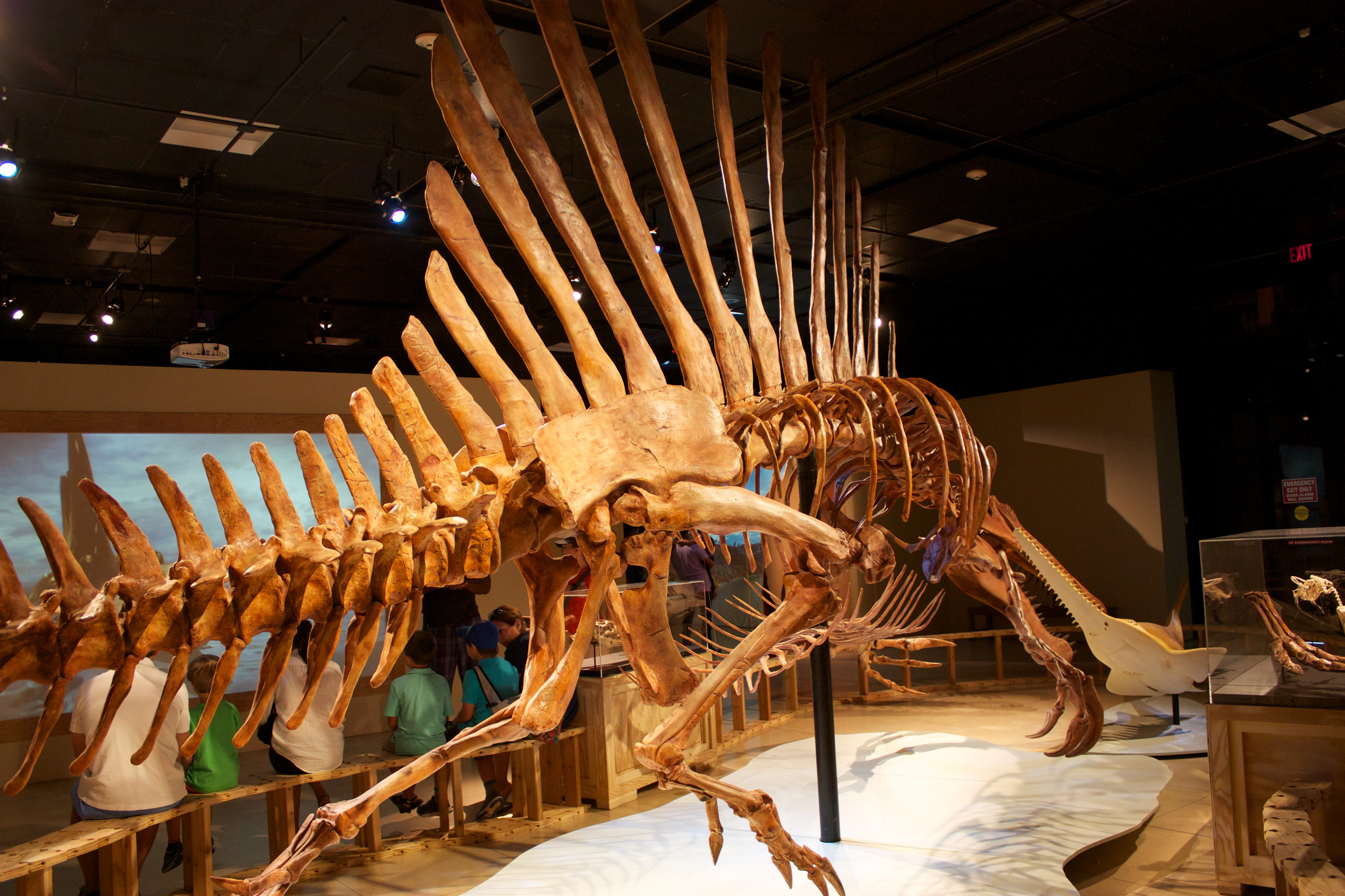 Spinosaurus